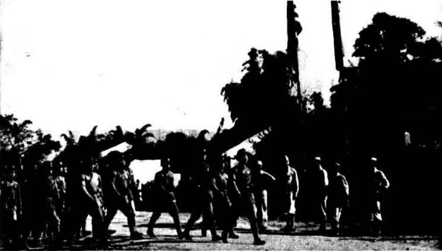 中文（中国大陆）: 1944年中国远征军占领芒市